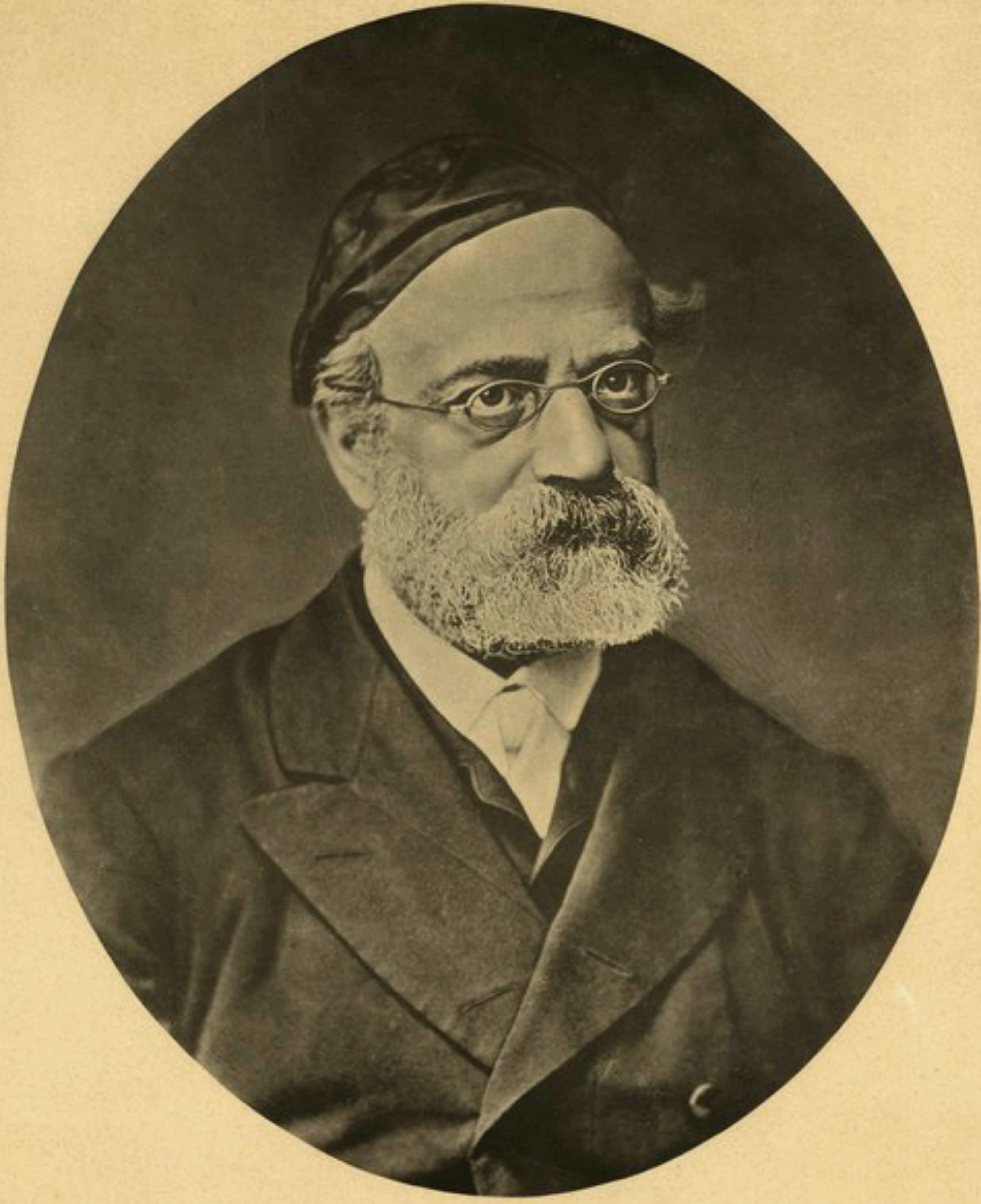 דיוקן הרב שמשון רפאל הירש.